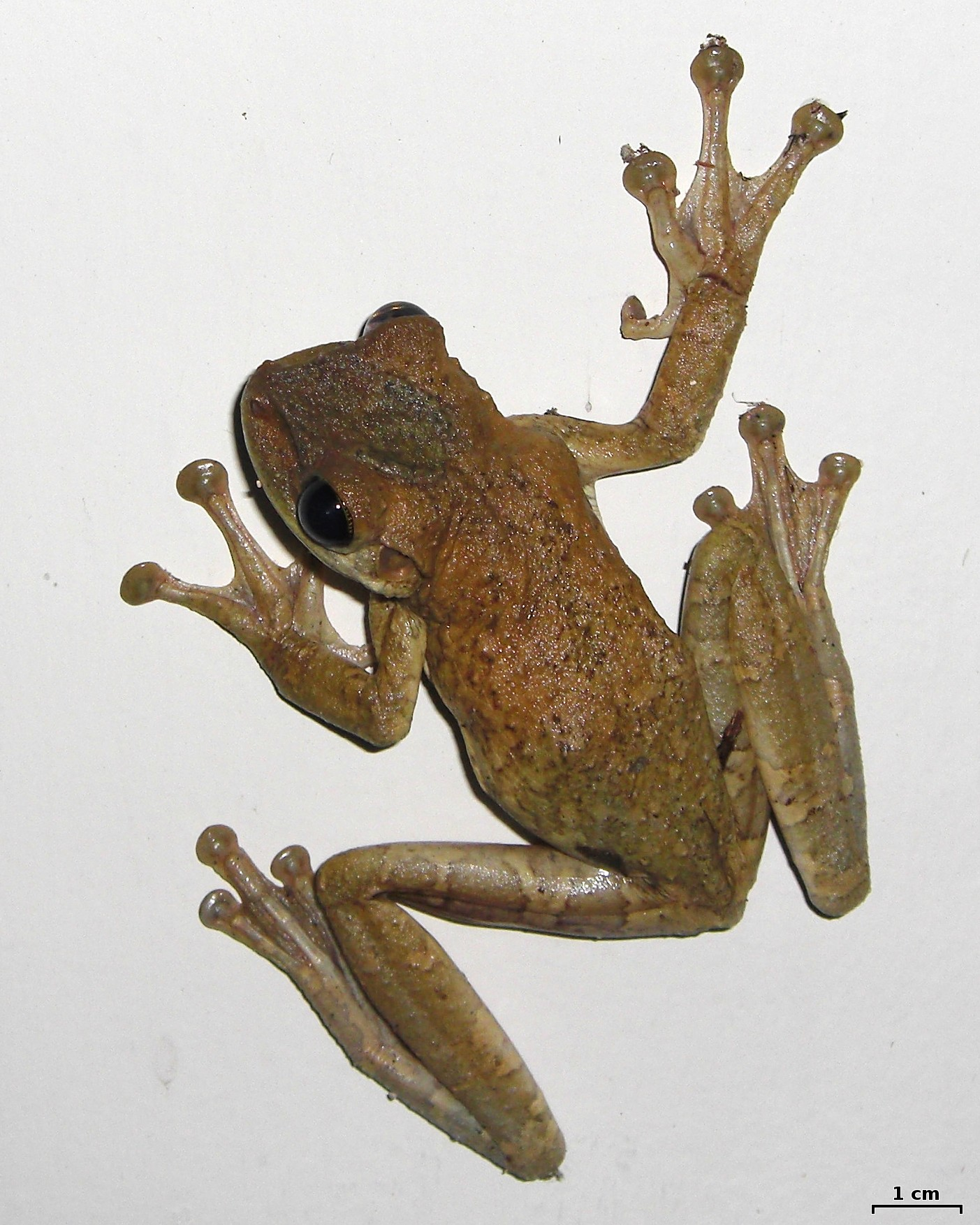 Amazon, Peru, 20130114